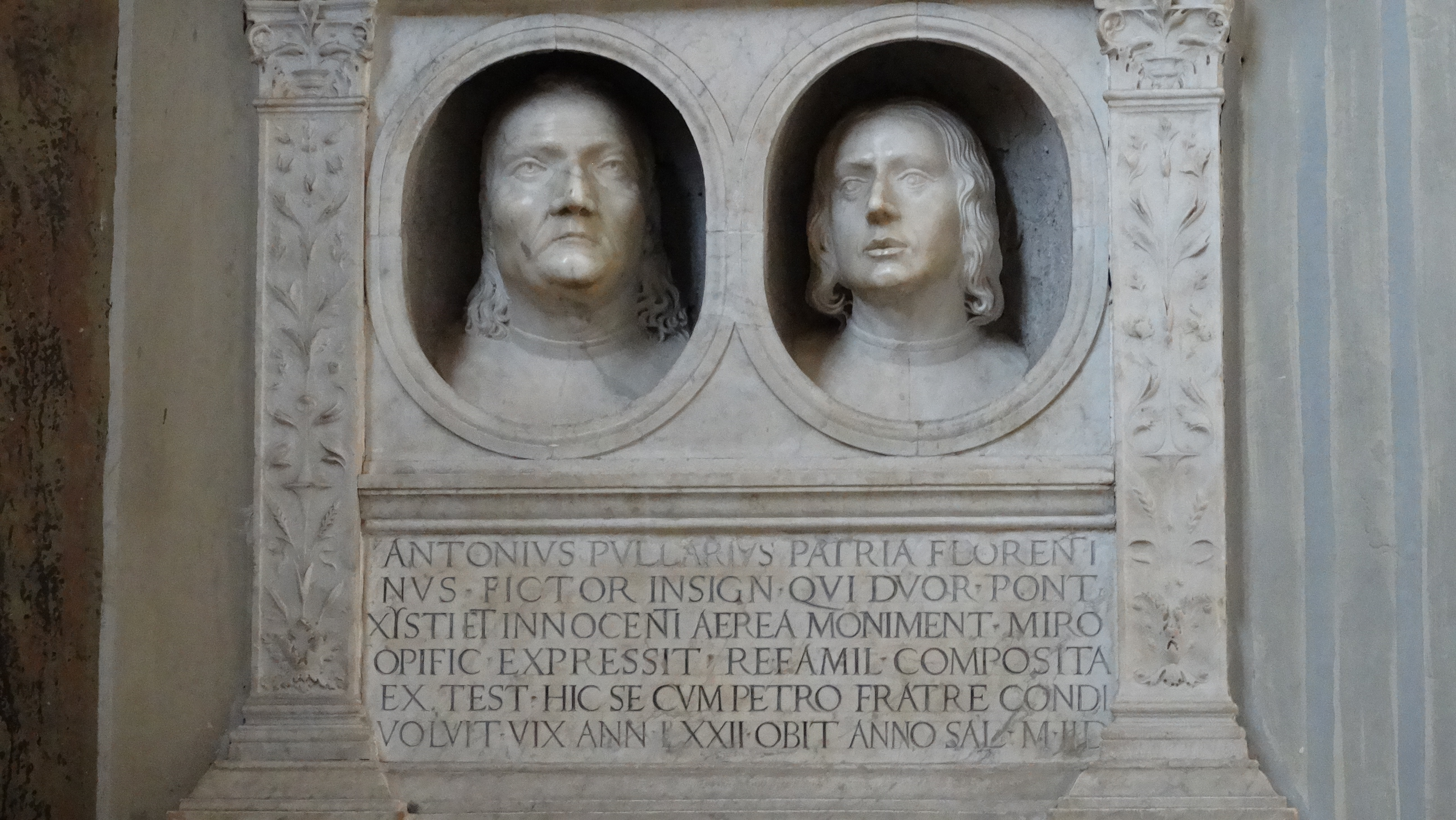 Tomba di Antonio e Piero Del Pollaiolo scolpita da Luigi Capponi 1498/1510